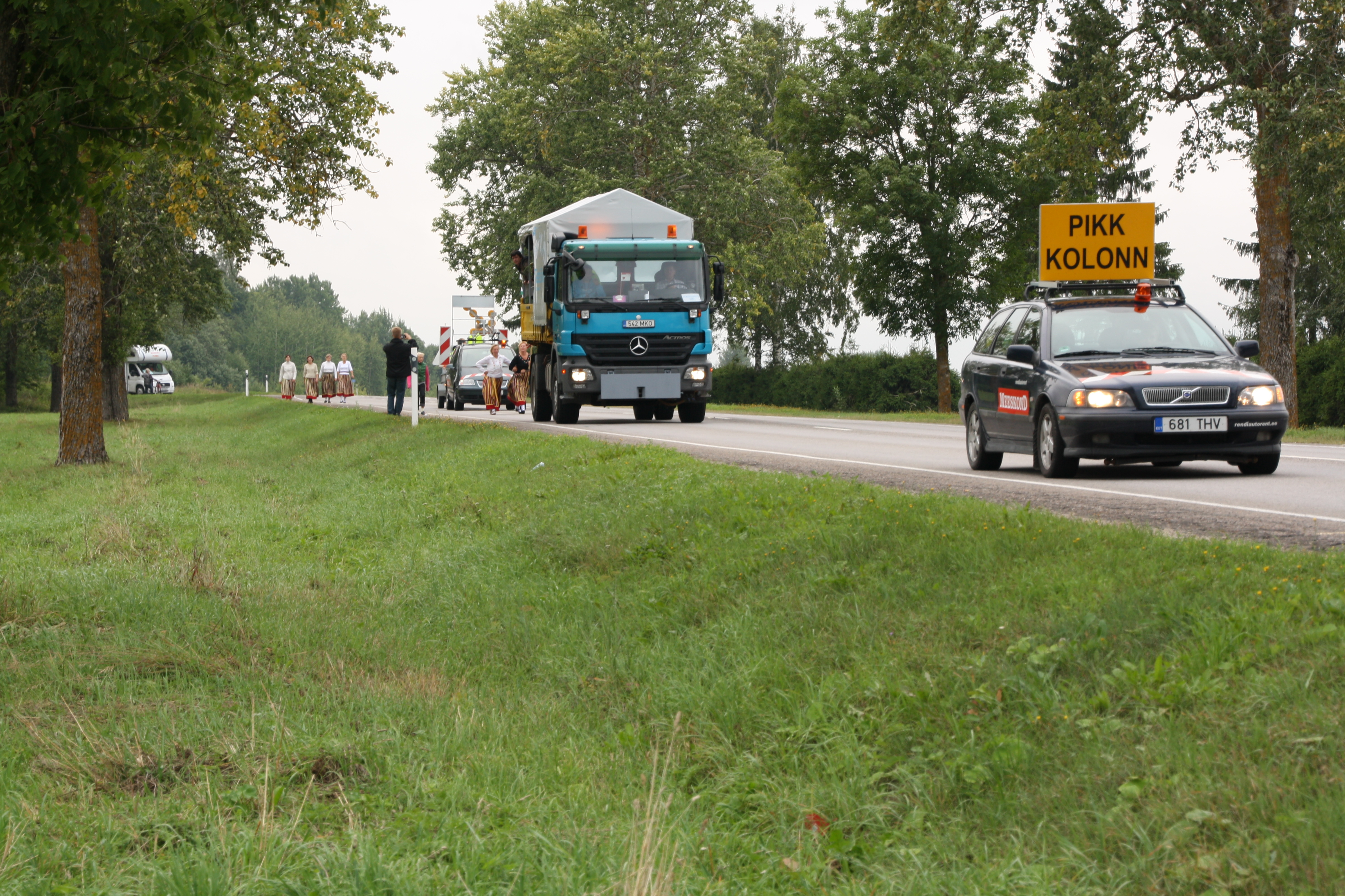 Teatetants 2011